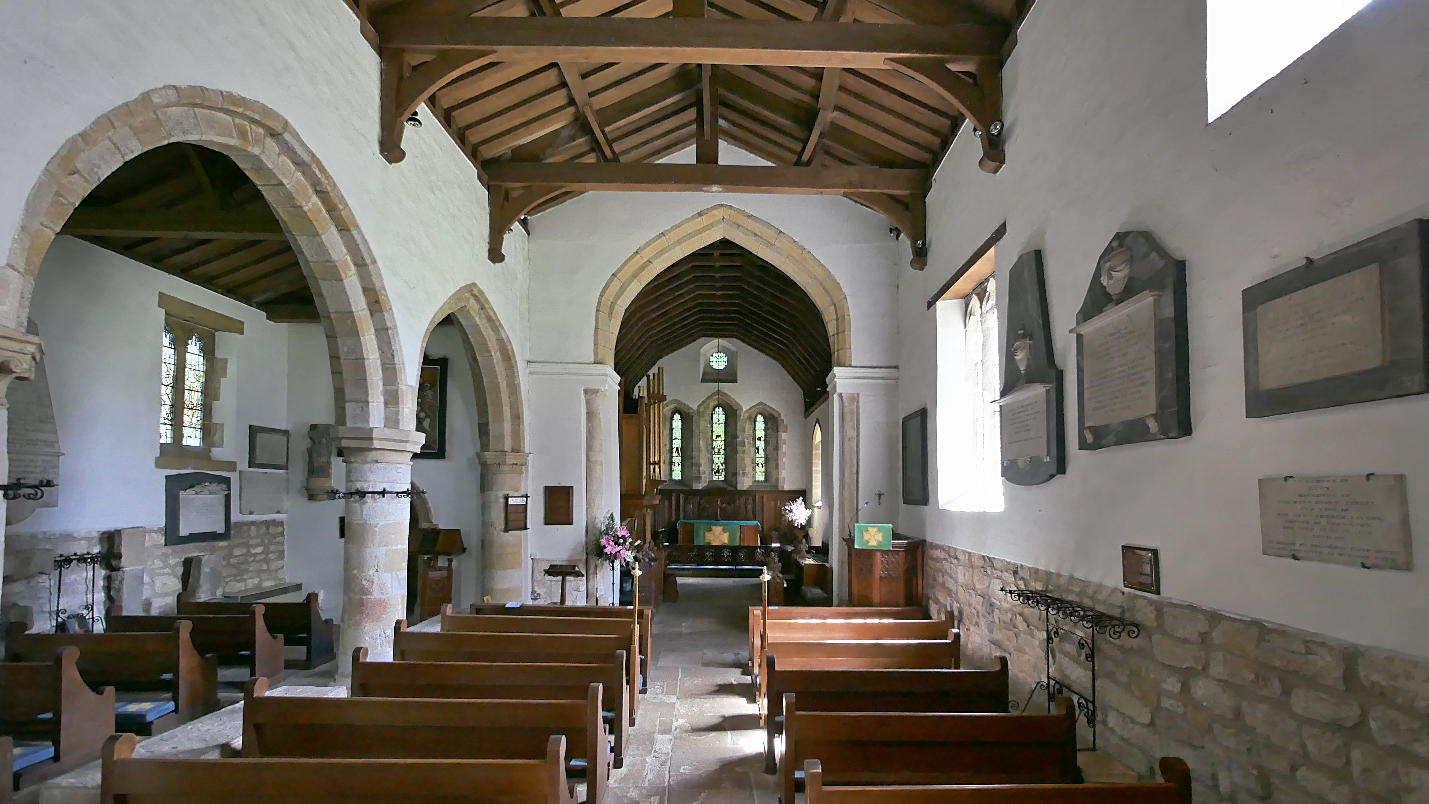 St Gregory's Minster, Kirkdale - view from the nave